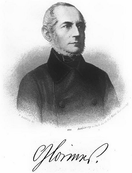 Carl Ignatz Lorinser, 1796 - 1853, deutscher Arzt